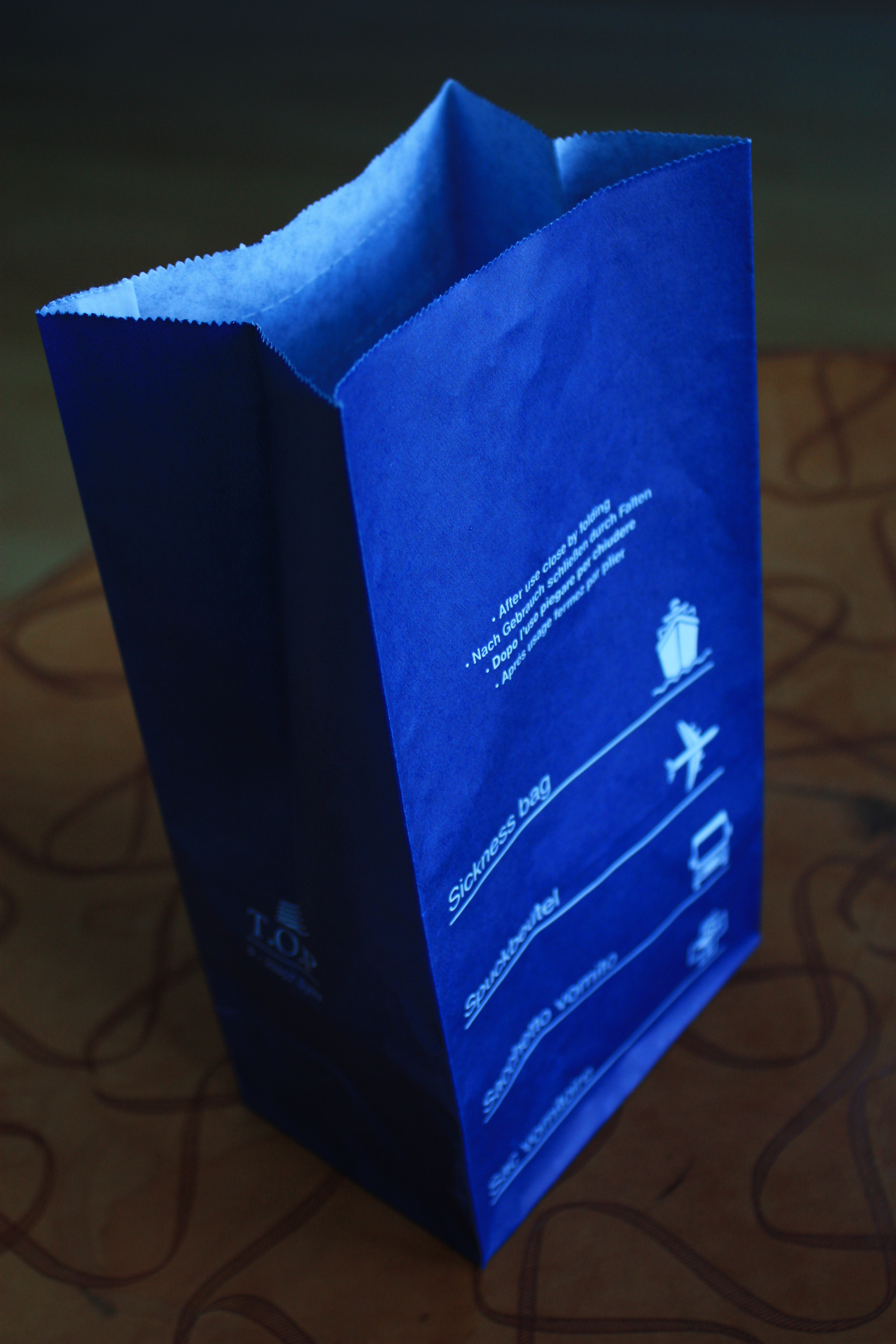 Airsickness bags, Seasickness bags, Speibeute, Kotztüten - hergestellt in Syke, Niedersachsen, Deutschland